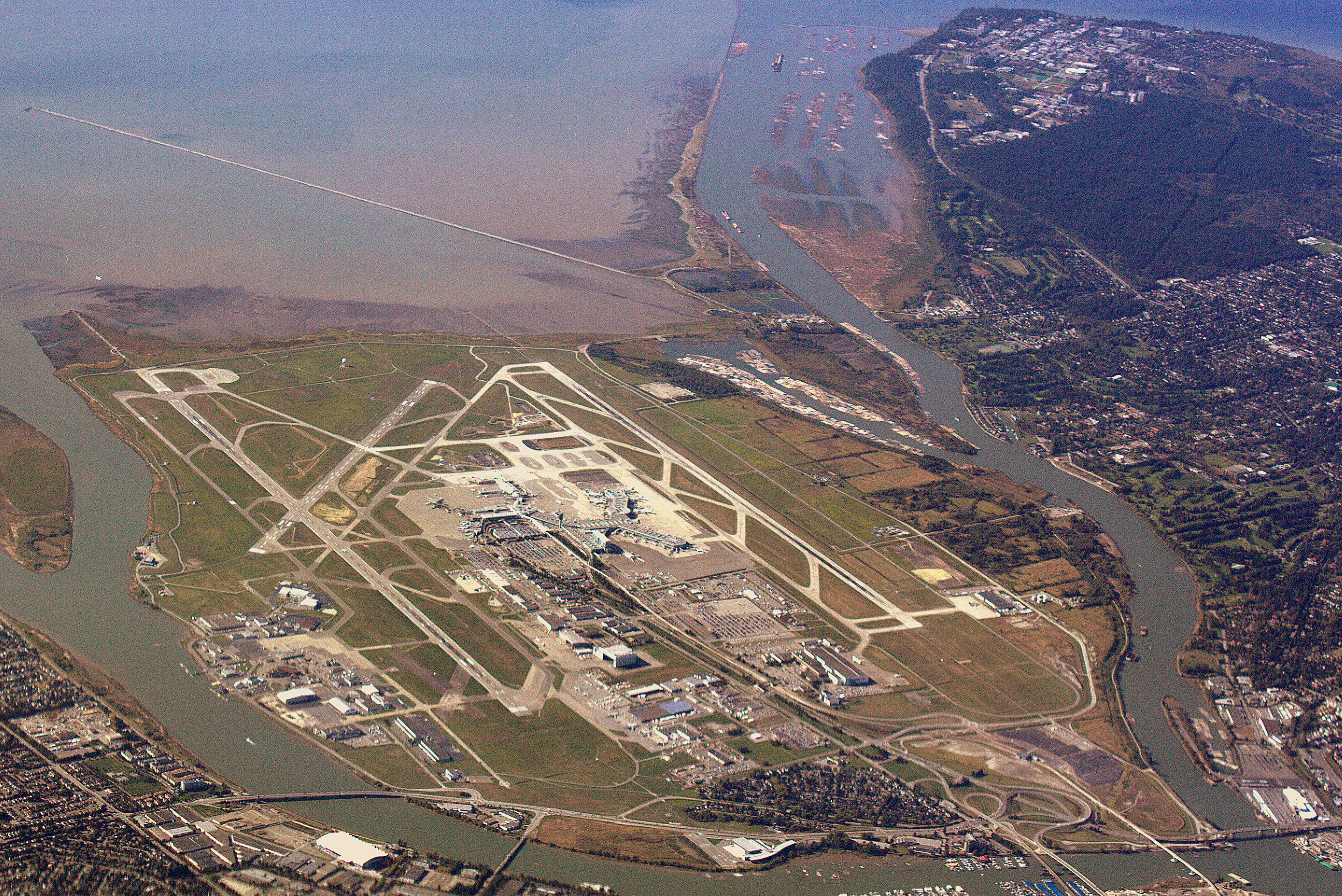 YVR